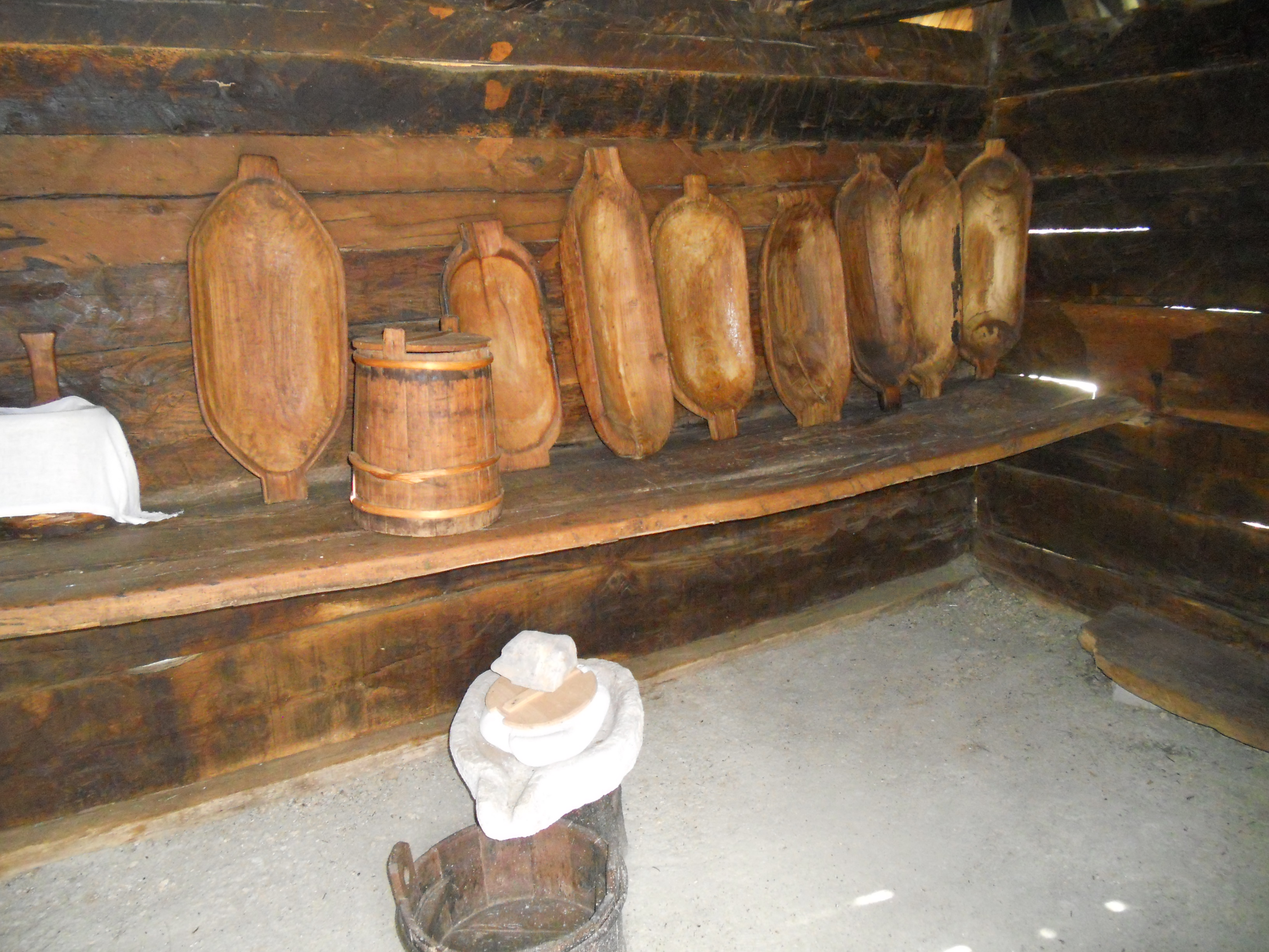 Muzej na otvorenom "Staro selo" Sirogojno